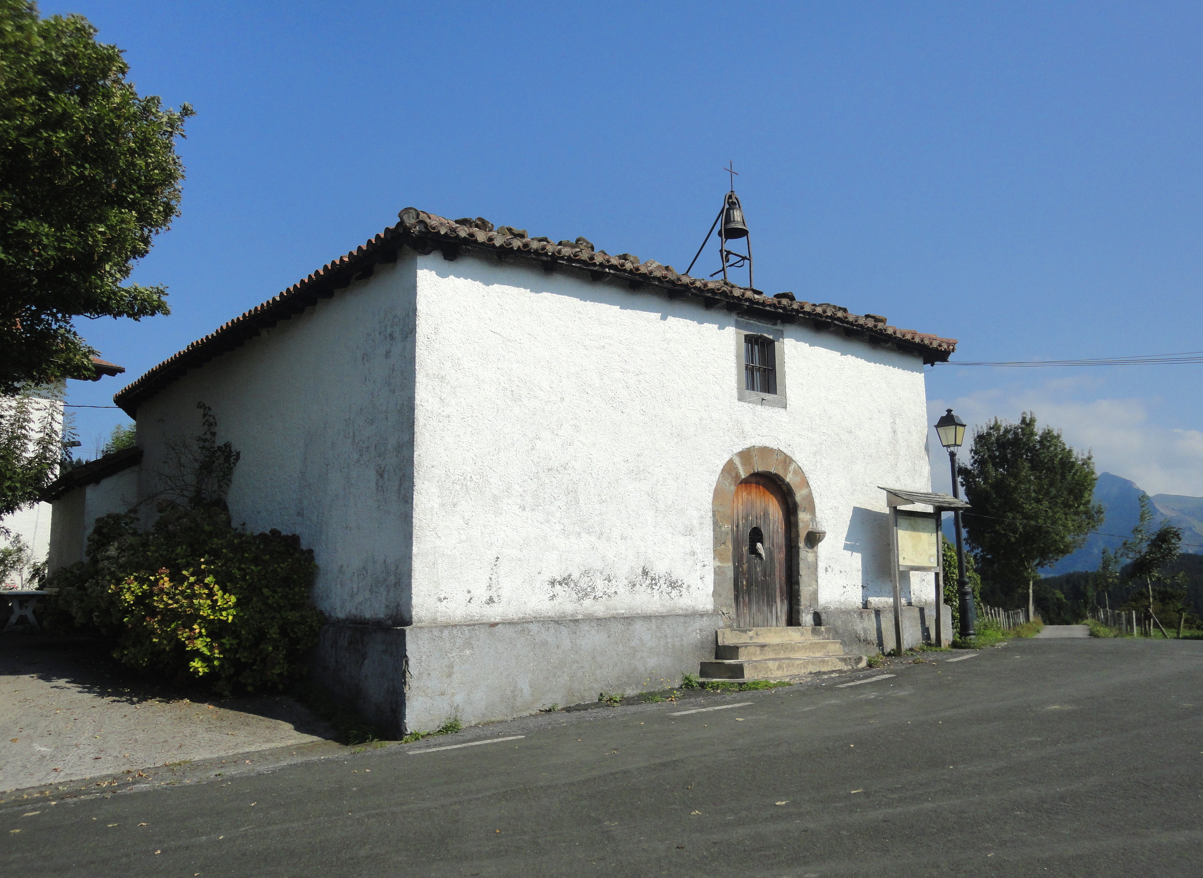 Altzagarate ermita - Altzaga